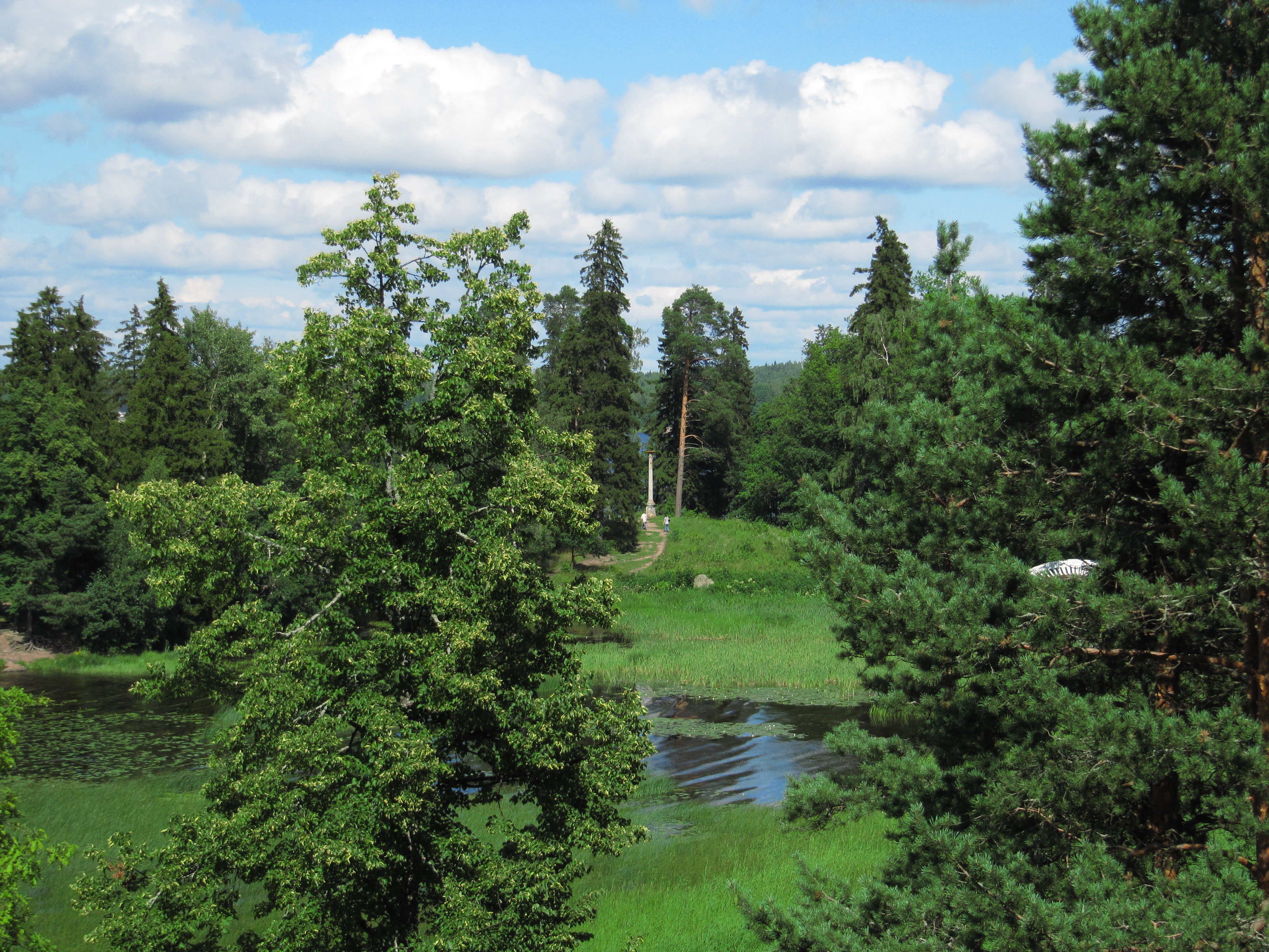 Парк: парк Монрепо, Выборг, Выборгский район, Ленинградская область